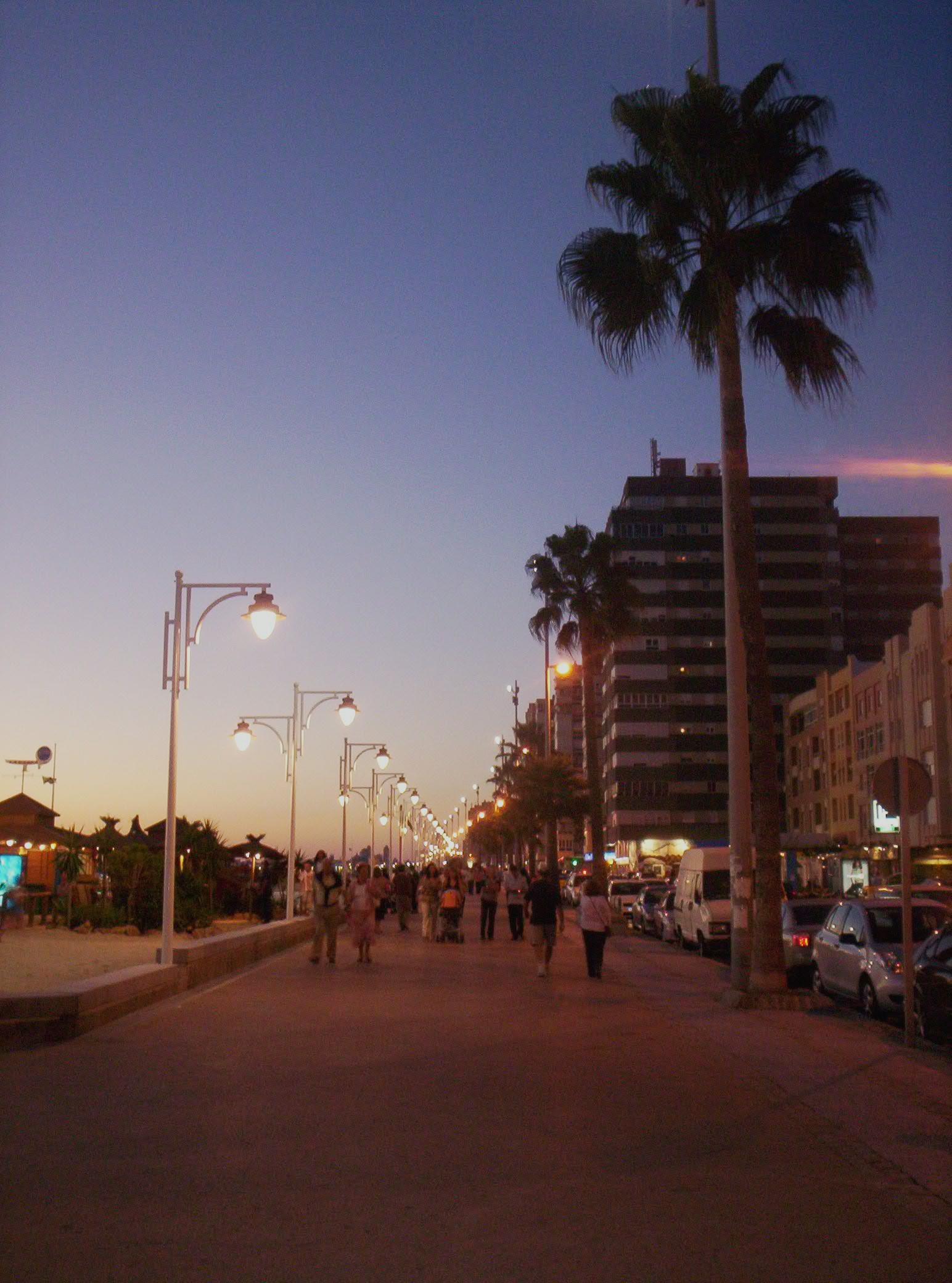 Vista, al anochecer, del paseo marítimo emplazado al lado de la Playa de la Victoria, en Cádiz (España).